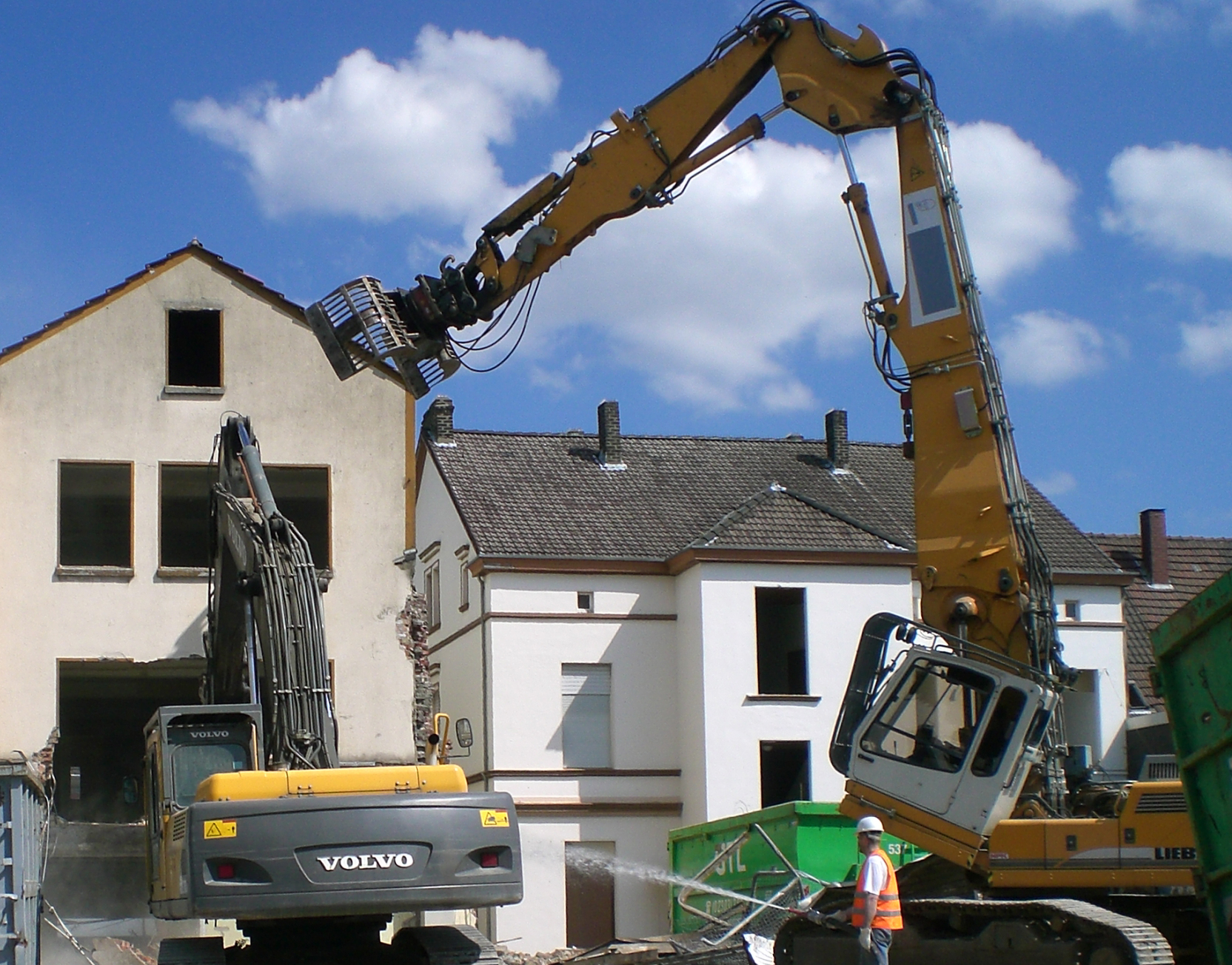 Liebherr 934 Longfront auf einer Abbruchbaustelle